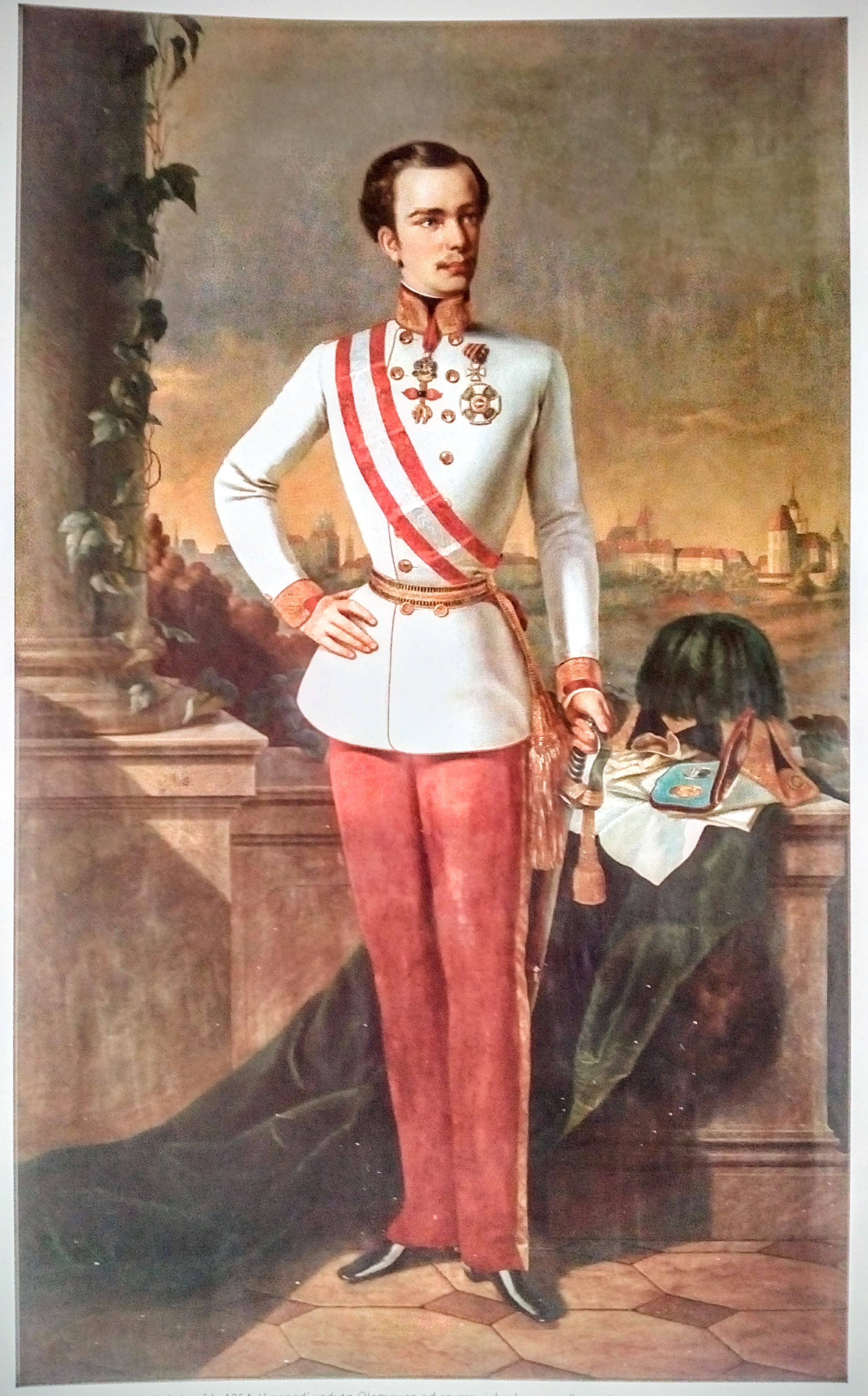 Malba Františka Josefa I. z roku 1854 od Johanna Friedricha, která ho znázorňuje jako mladíčka po nástupu na trůn v roce 1848.